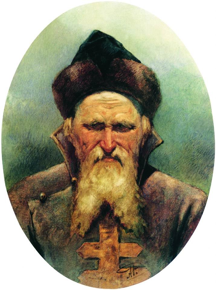 Стрелец. Окружная художественная галерея, Ханты-Мансийск